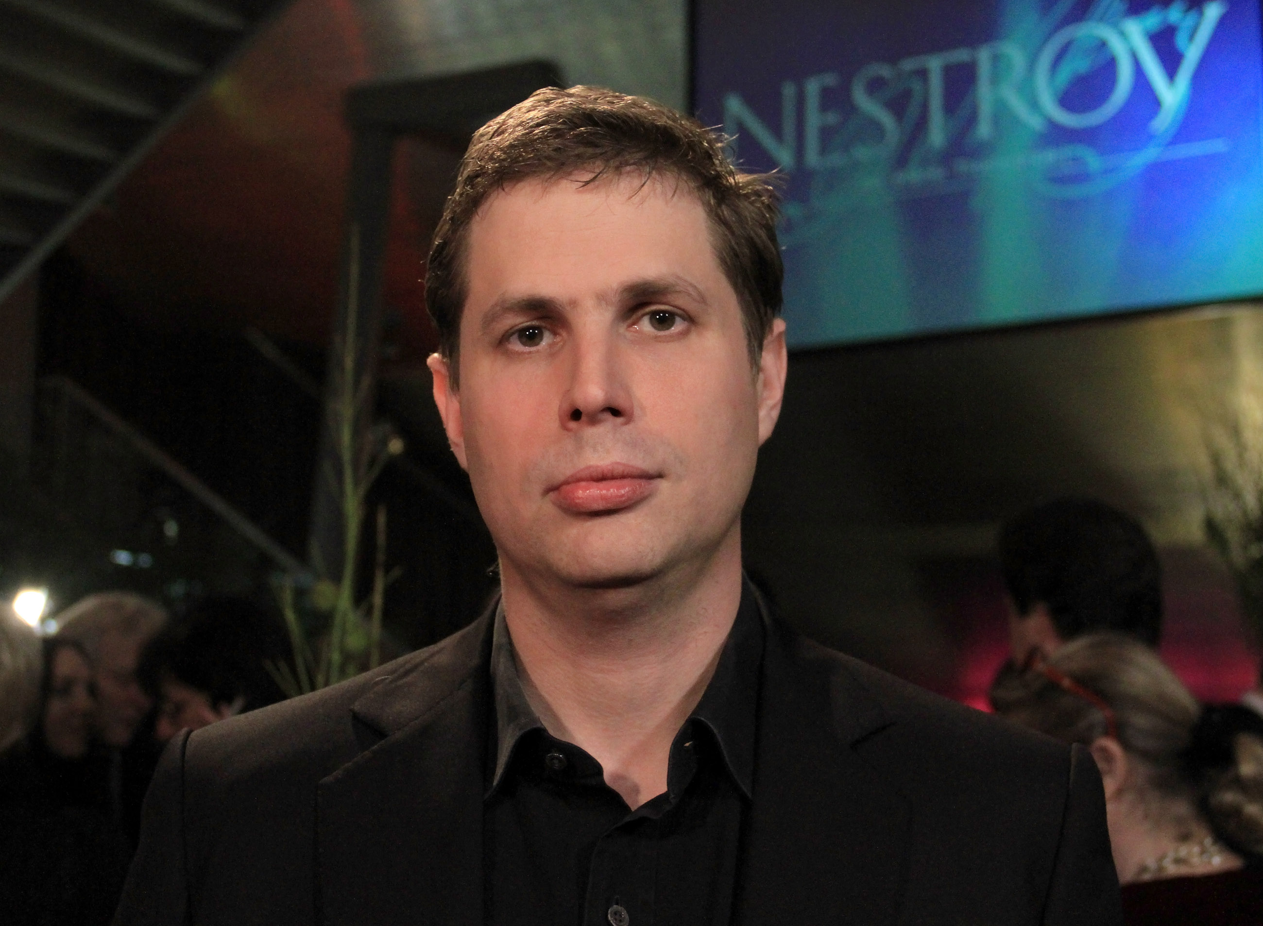 Daniel Kehlmann beim Nestroy-Theaterpreis 2012 im MuseumsQuartier in Wien.